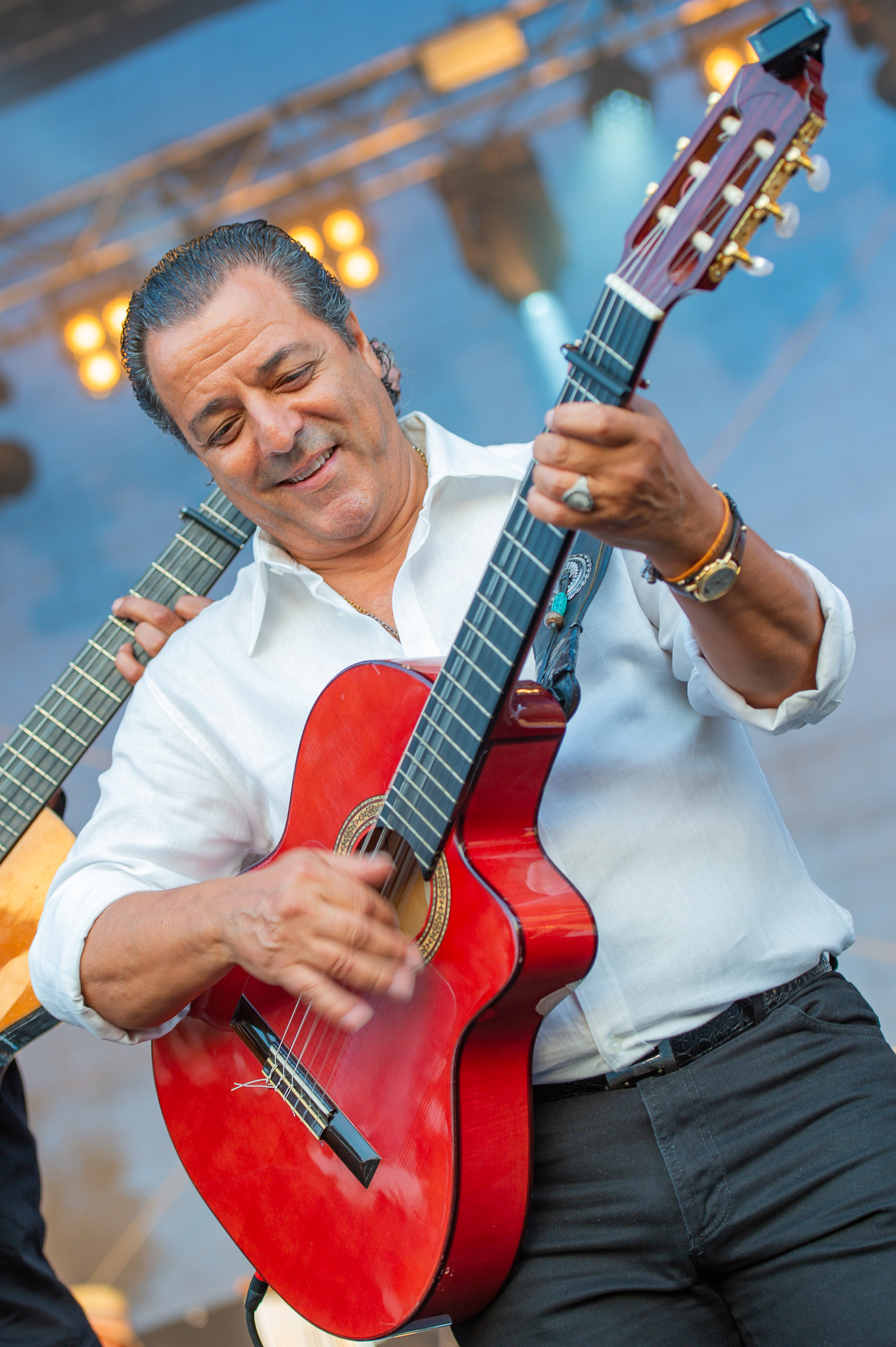 Brombachsee,Chico Bouchikhi,Concertbüro Franken,Festival,Konzert,Lieder am See,Livekonzert,Livemusik,Musik,The Original Gypsies